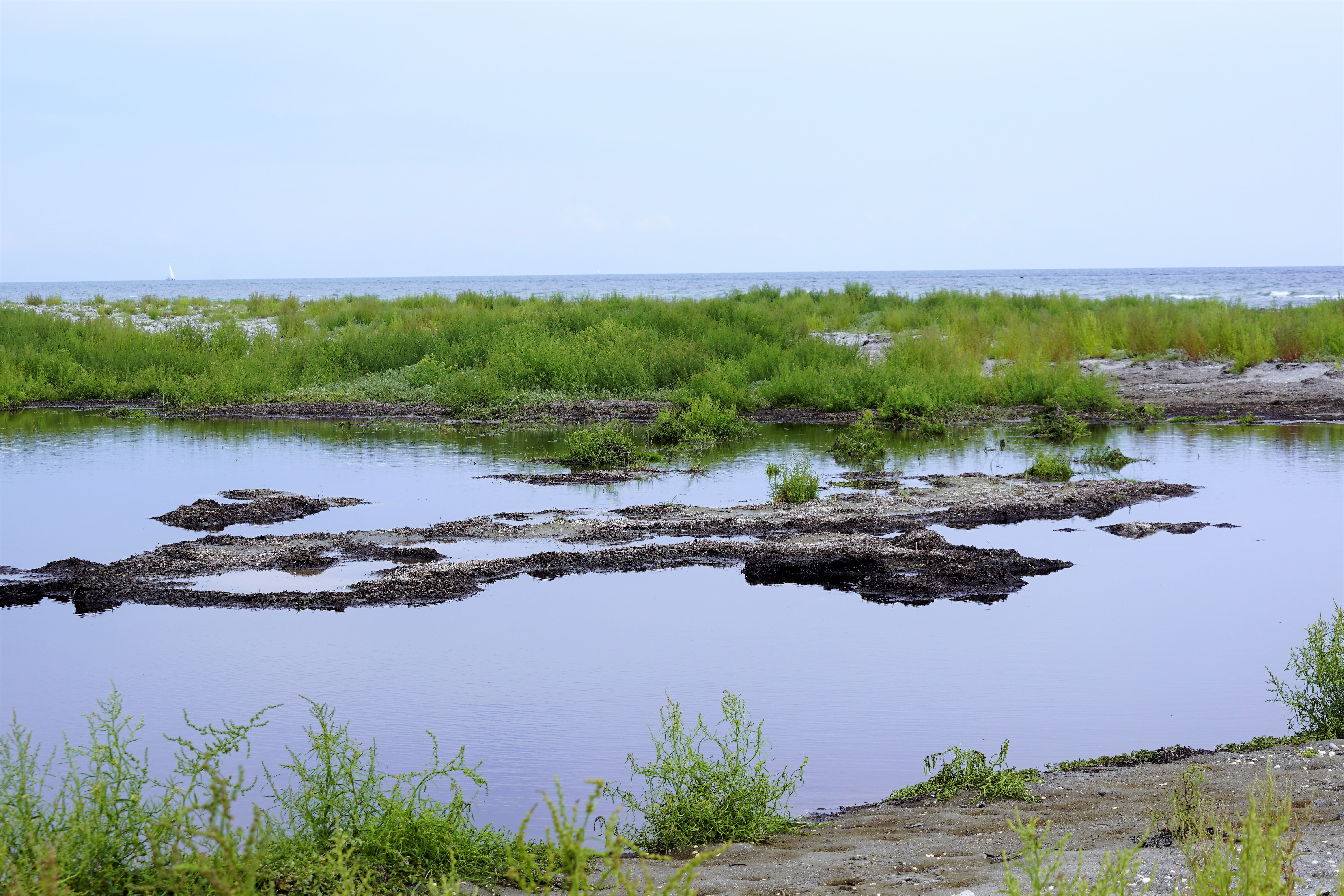 Strandlagune på sydenden af Bløden Hale